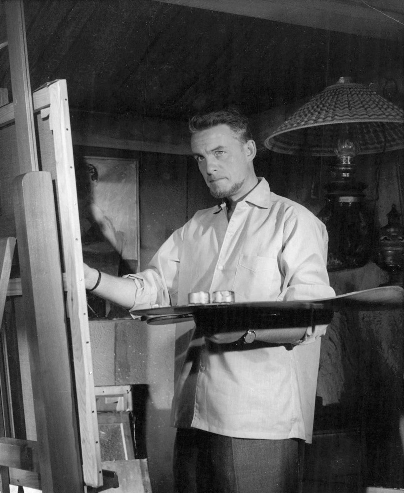 "Sommarnöje sökes". Vår bild visar Alf Kjellin som Arne Forsman, konstnär. Tavlorna som användes i filmen såsom Forsmans produktion var alla målade av konstnären Bengt Hegethorn. Inklusive tavlan i bakgrunden på bilden.